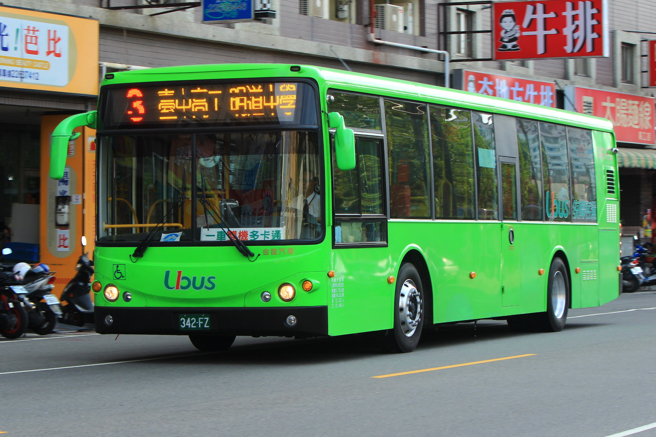 3路 台中高工